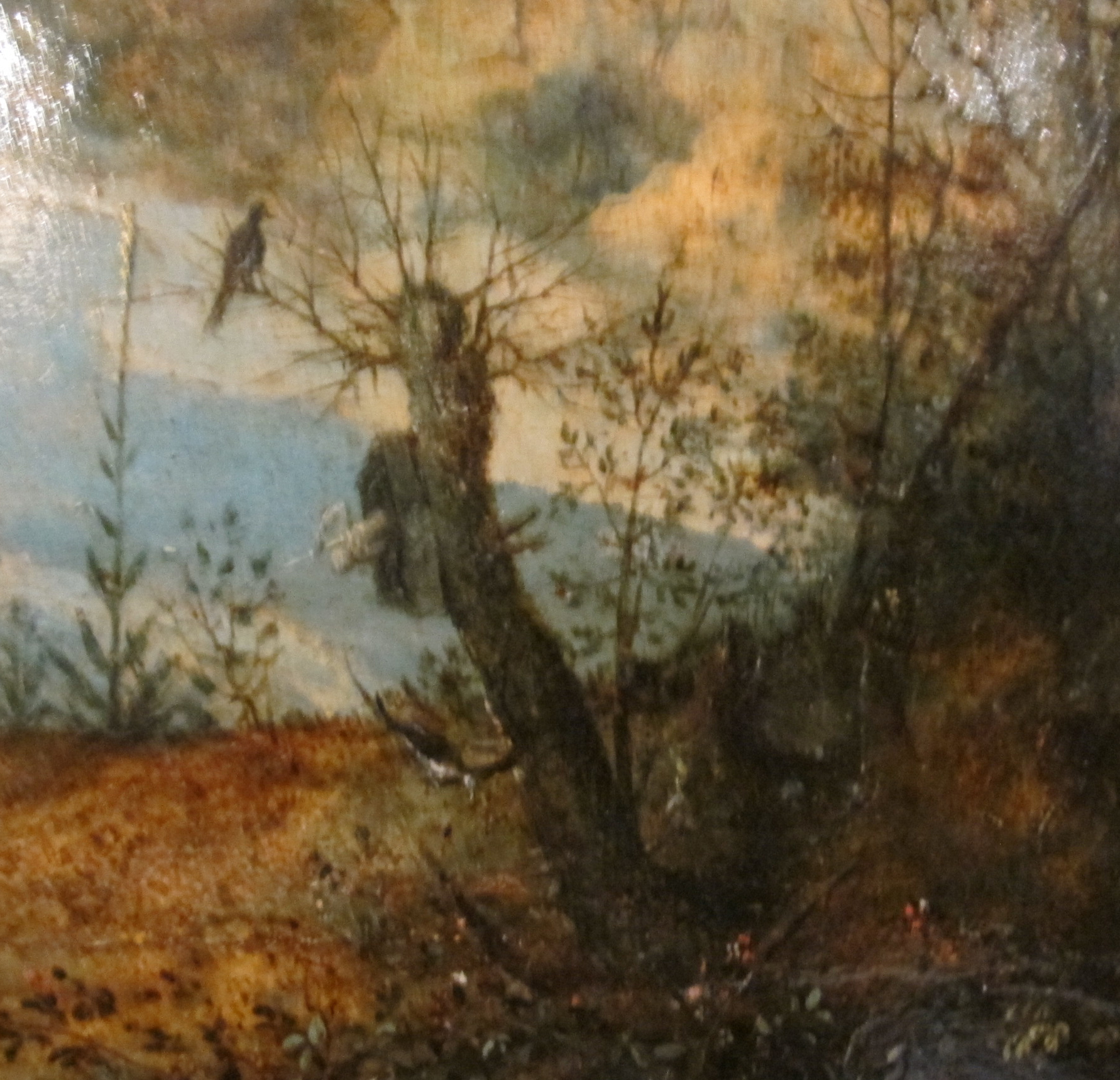 Peter bruegel il vecchio, paesaggio con fuga in egitto, 1563